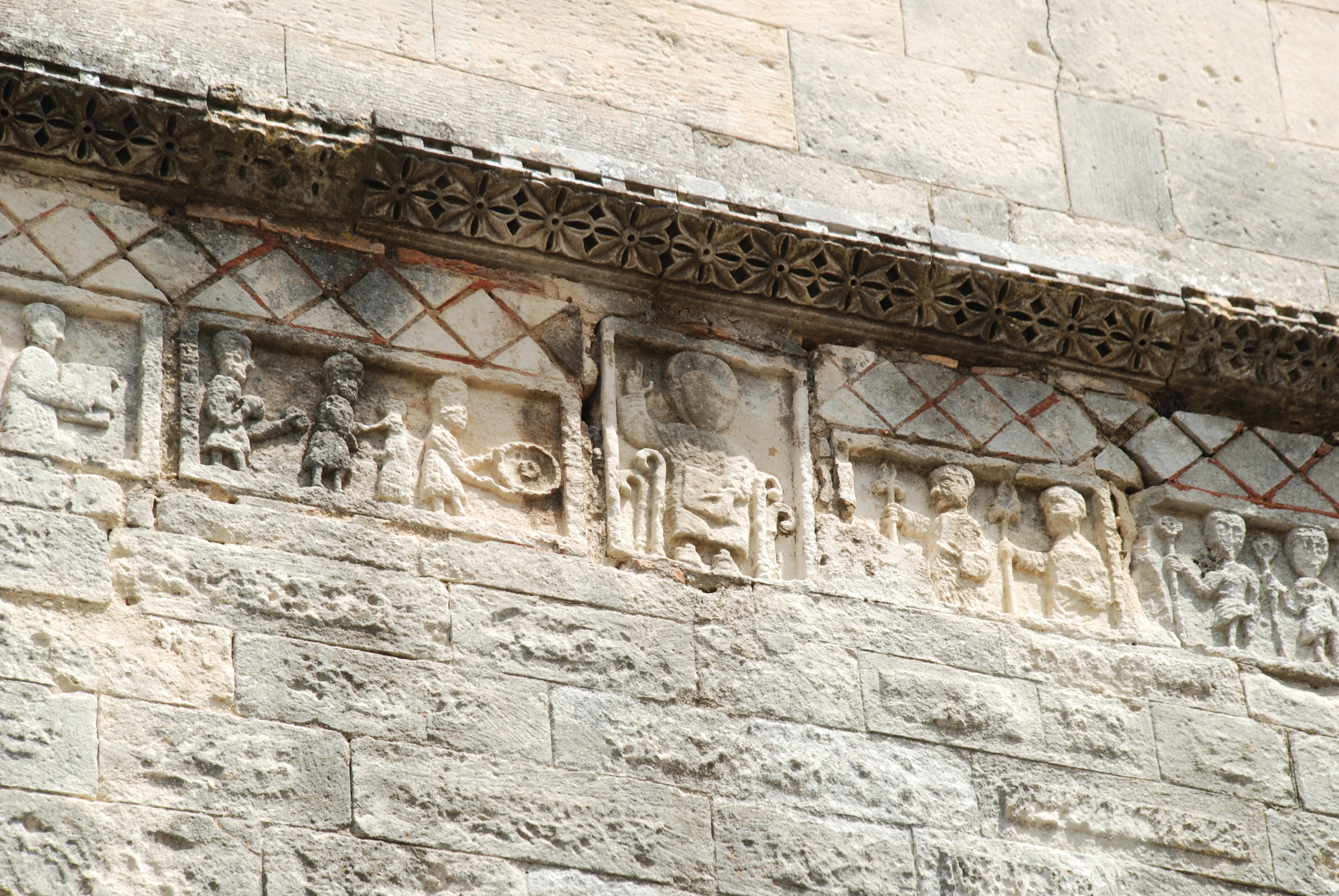 France - Drôme - Tour funéraire de Saint-Restitut - Frise romane